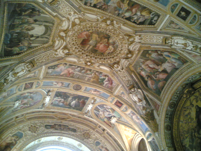 Affreschi del Monte di Pietà (Napoli)